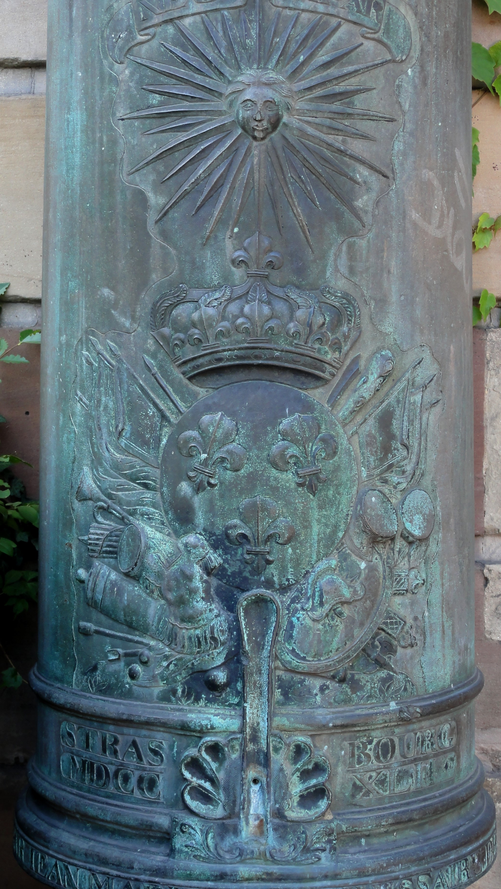 Alsace, Bas-Rhin, Strasbourg, Ancienne école d’artillerie (1705), Cercle-mess des officiers et sous-officiers (depuis 1872): Canons (XVIIIe-XIXe), 17 place Broglie.